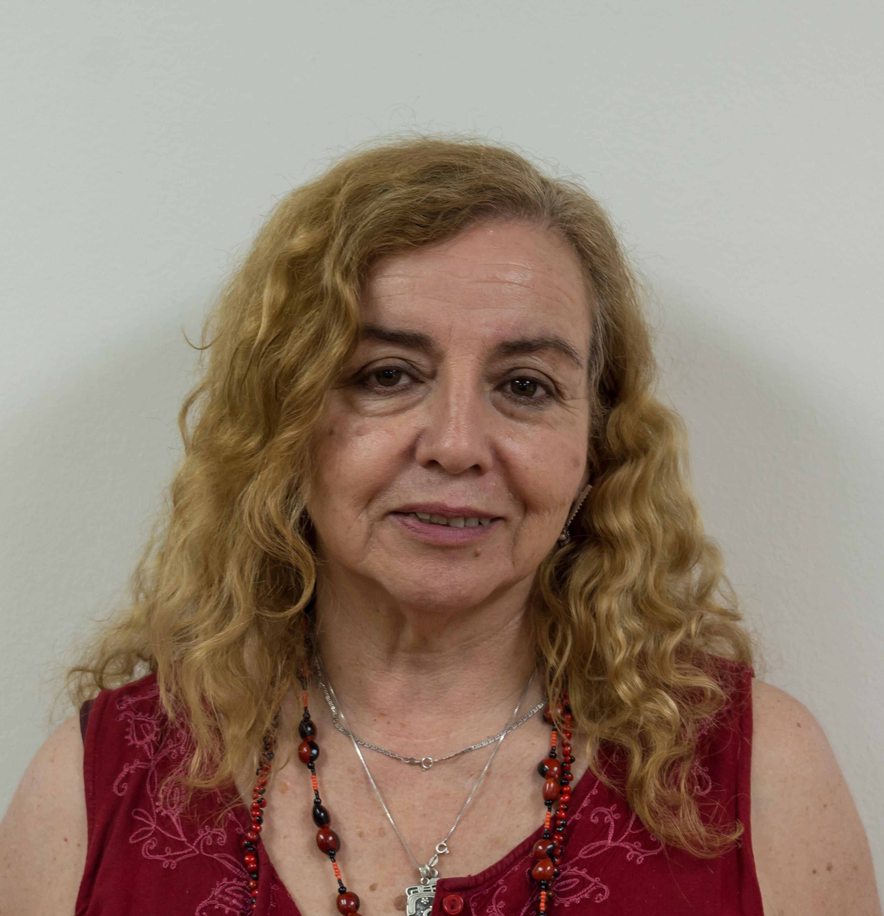 Cristina Larco, Editatón de Escritores Chilenos, UTEM, Santiago, Chile